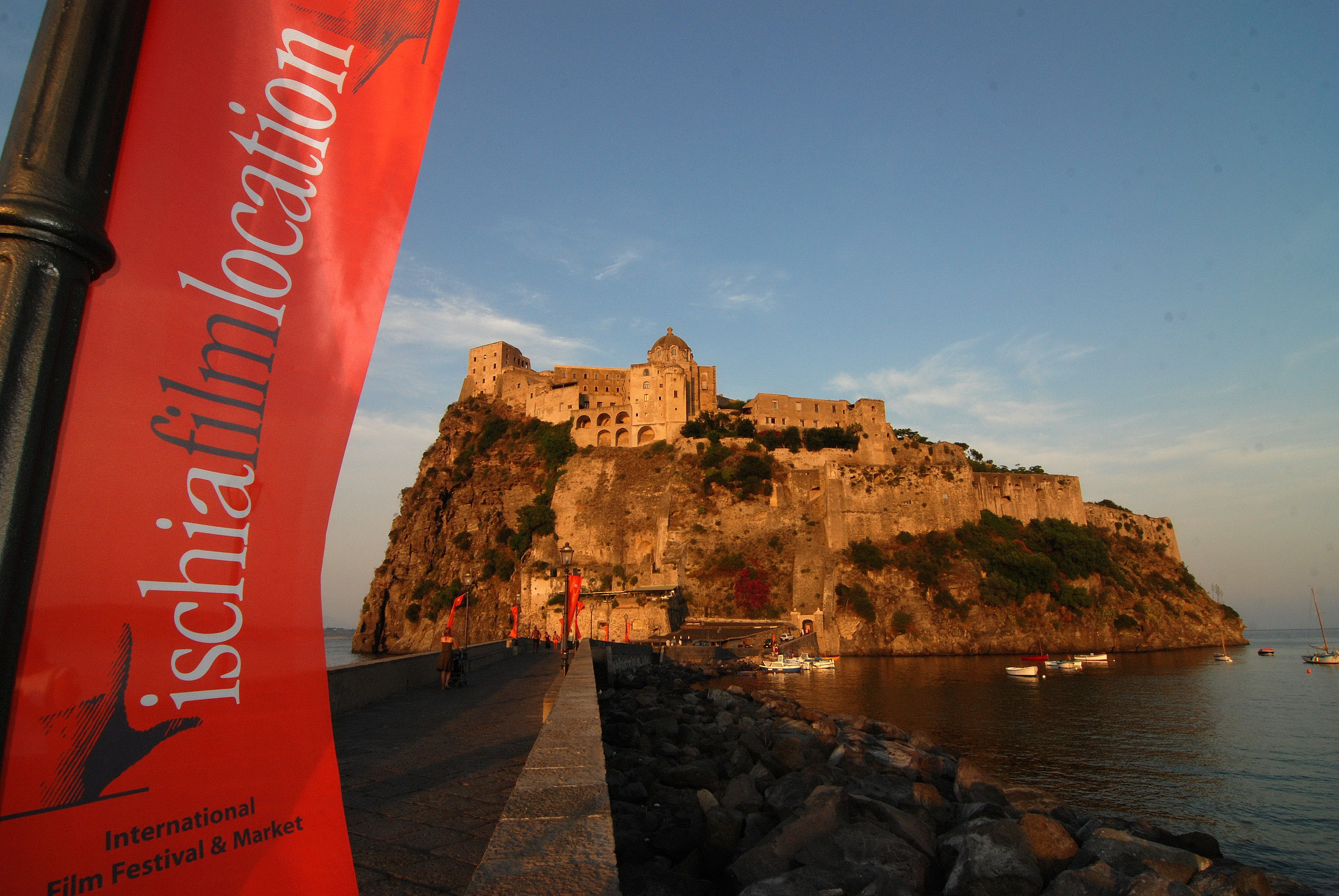 Castello Aragonese sede esclusiva dell'Ischia Film Festival il concorso internazionale dedicato alle location cinematografiche.